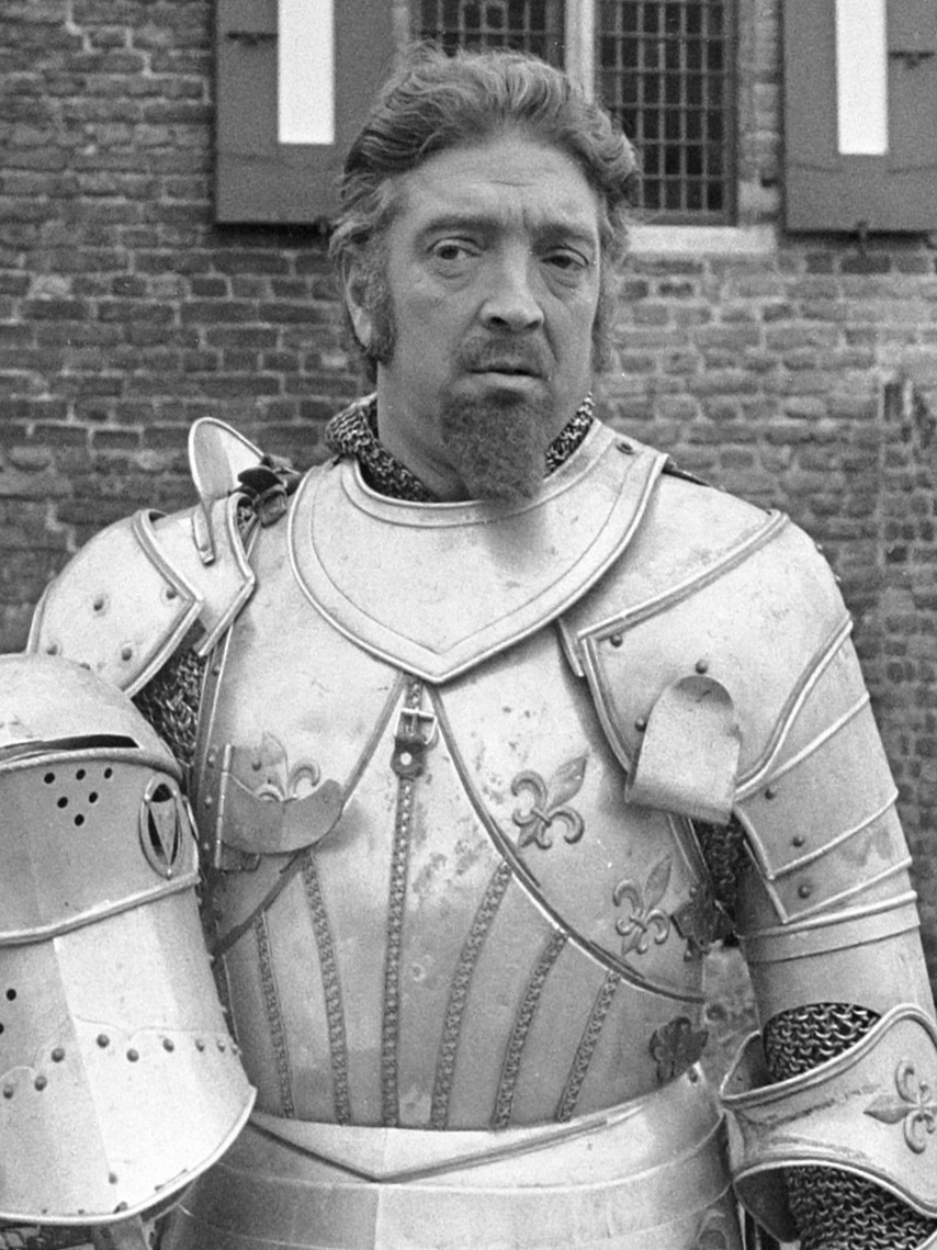 Opname van de Jeugdserie Floris door de NTS op kasteel Doornenburg in de Betuwe; kasteelheer Wolter van Oldenstein (gespeeld door Ton Vos) in zijn harnas